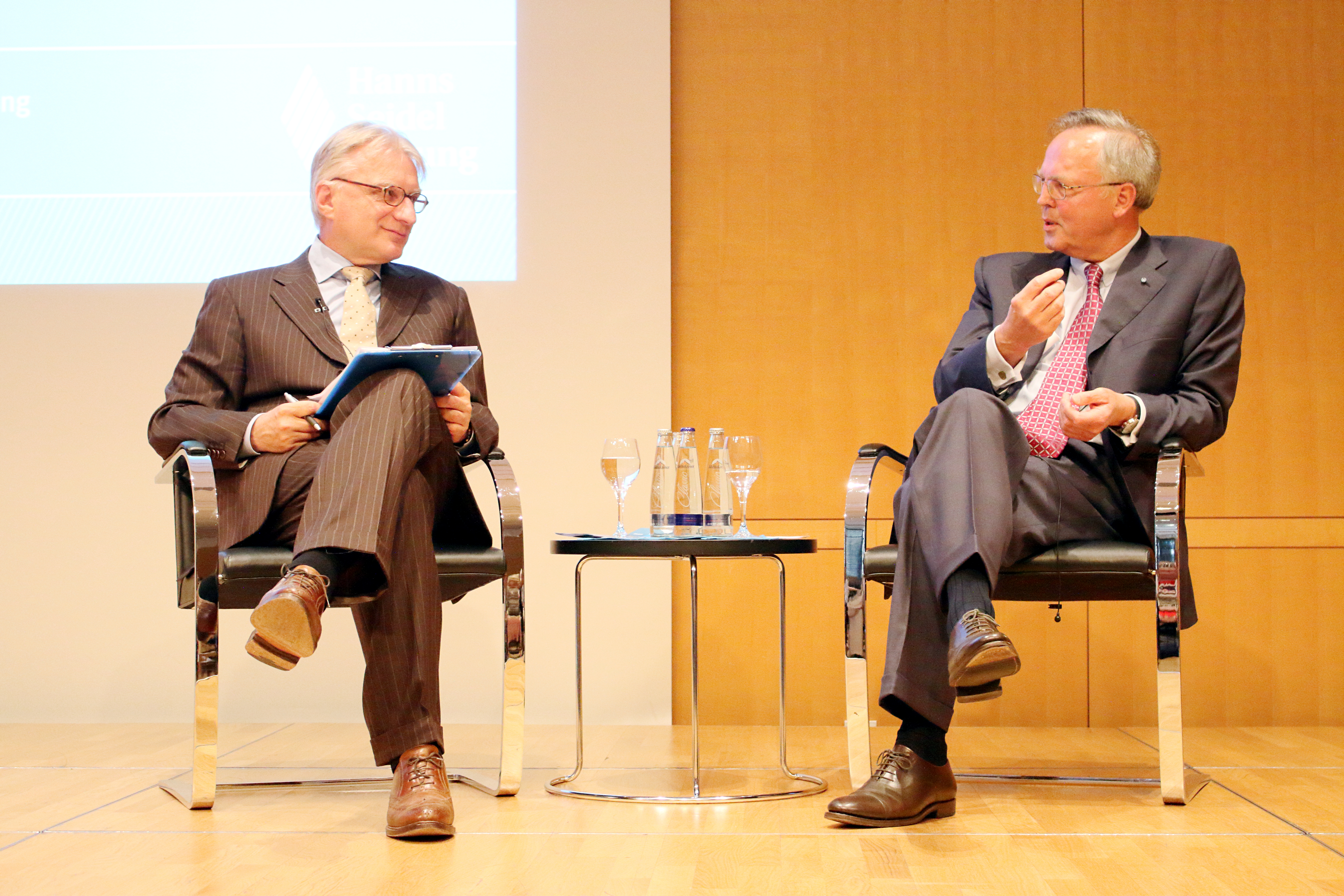 Wolfgang Krieger und Horst Möller, 2015 in der Hanns-Seidl-Stiftung, München